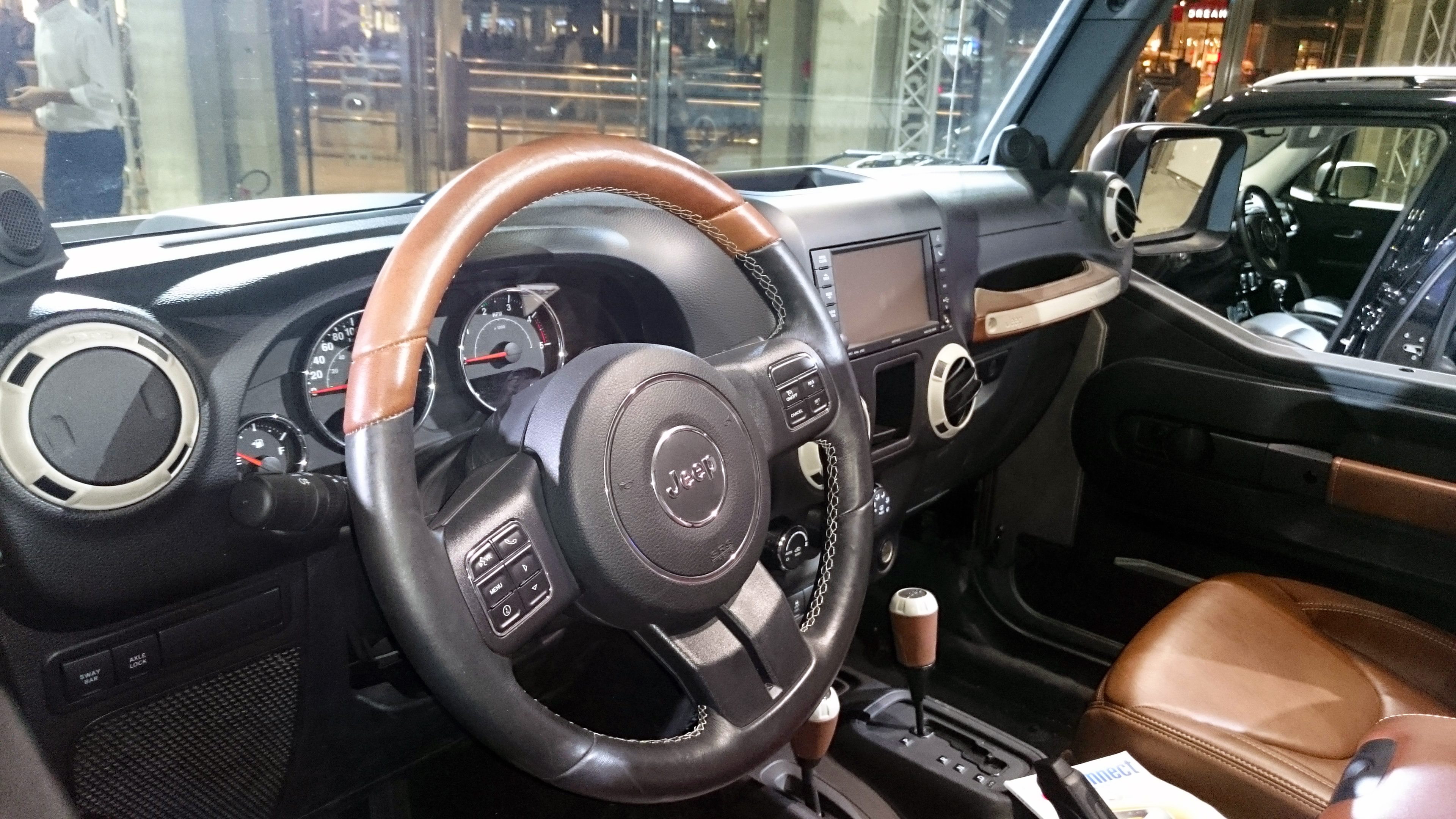 Temporary showroom (Temporary shop) Fiat - Jeep a Milano in Piazza Gae Aulenti con un Wrangler Rubicon con scocca in materiale polimerico